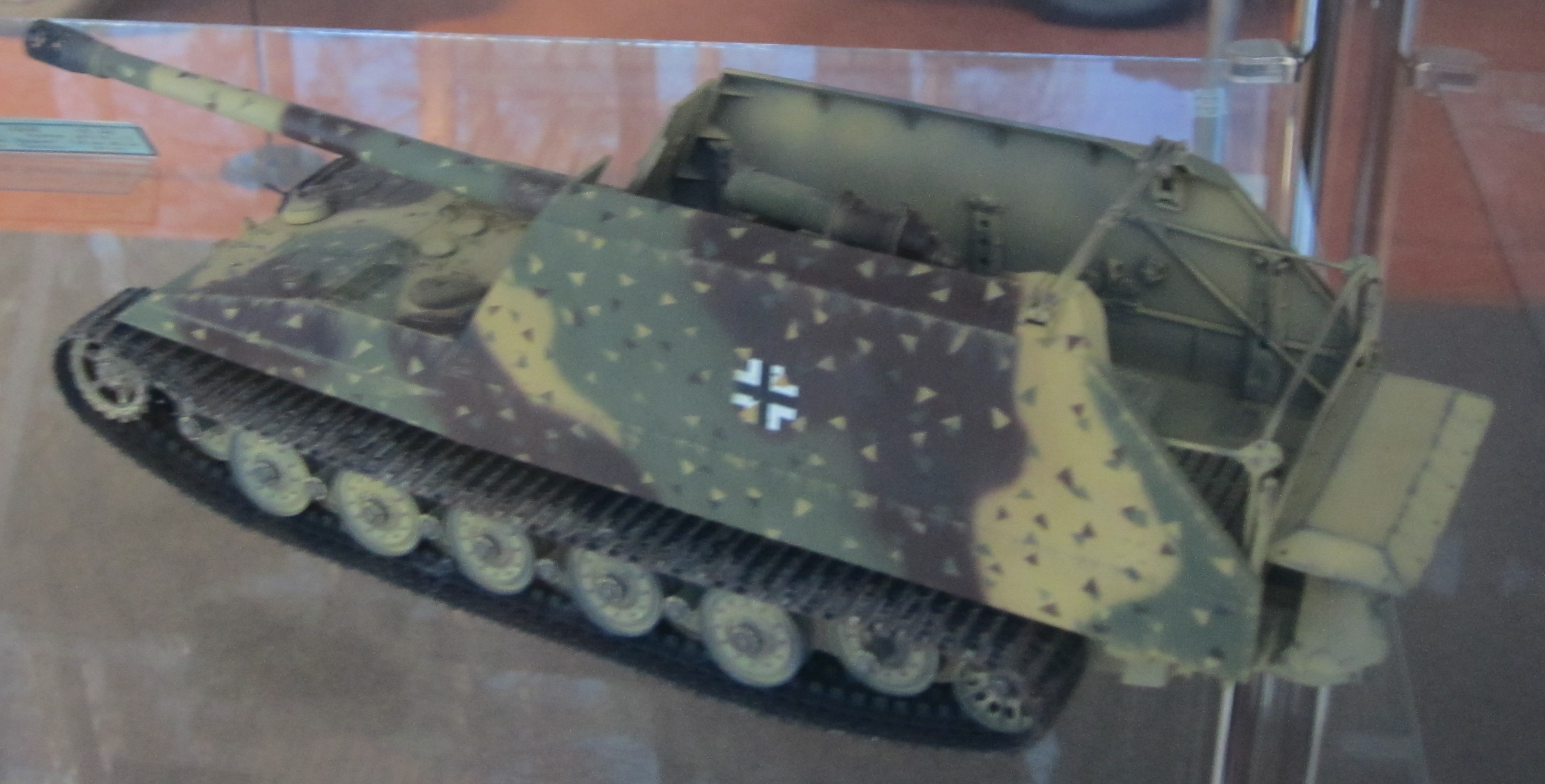 Модель САУ Geschutzwagen Tiger в масштабе 1-:35. Экспонат выставки моделей в Зеленогорском музее ретро-автомобилей